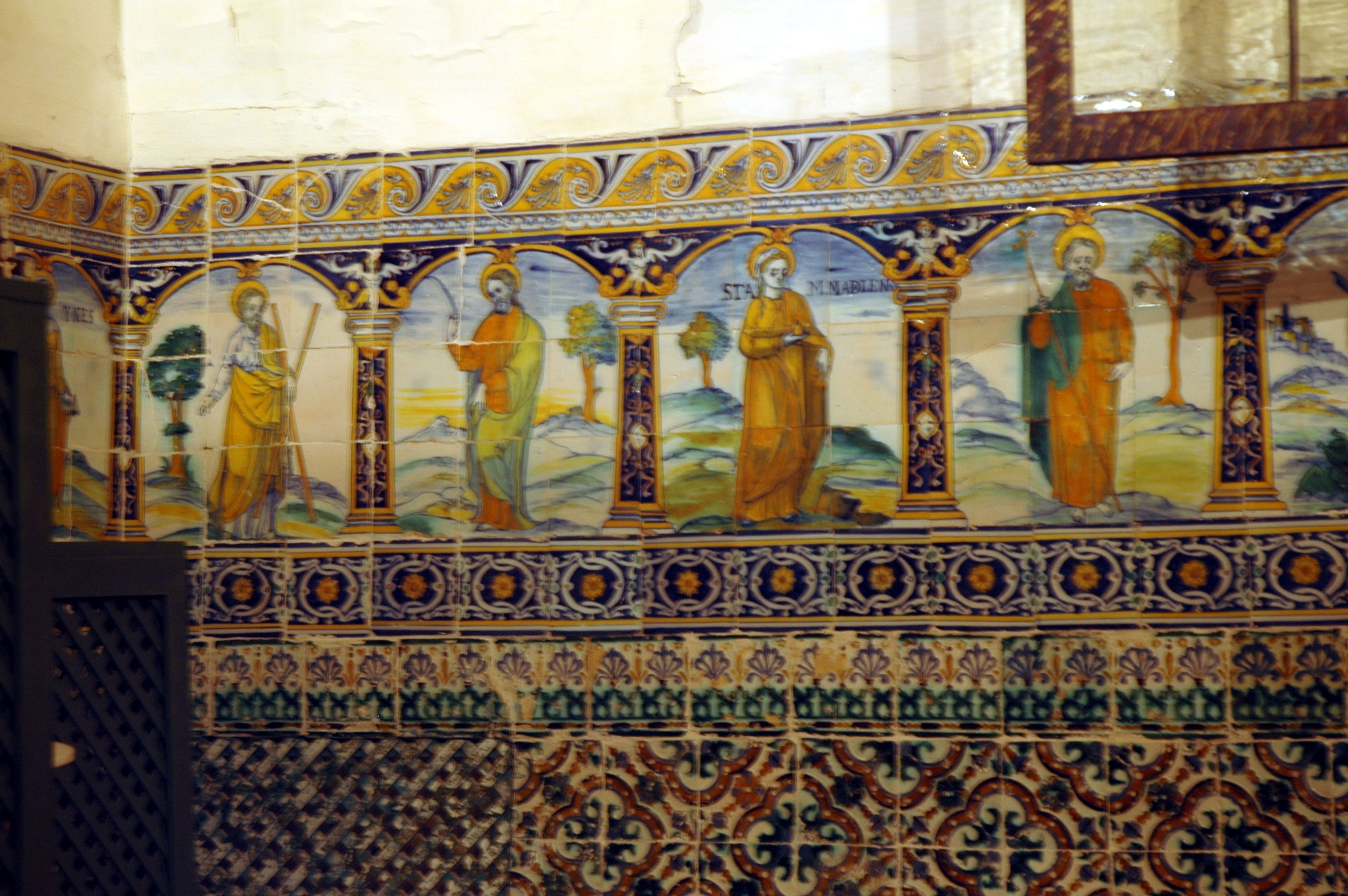 Valladolid, España. Capilla de San Francisco en el convento de Santa Isabel cuyos muros están decorados por un zócalo con banco con azulejos de tipo Talavera realizados en los alfares vallisoletanos del barrio de Santa María en el siglo XVI.